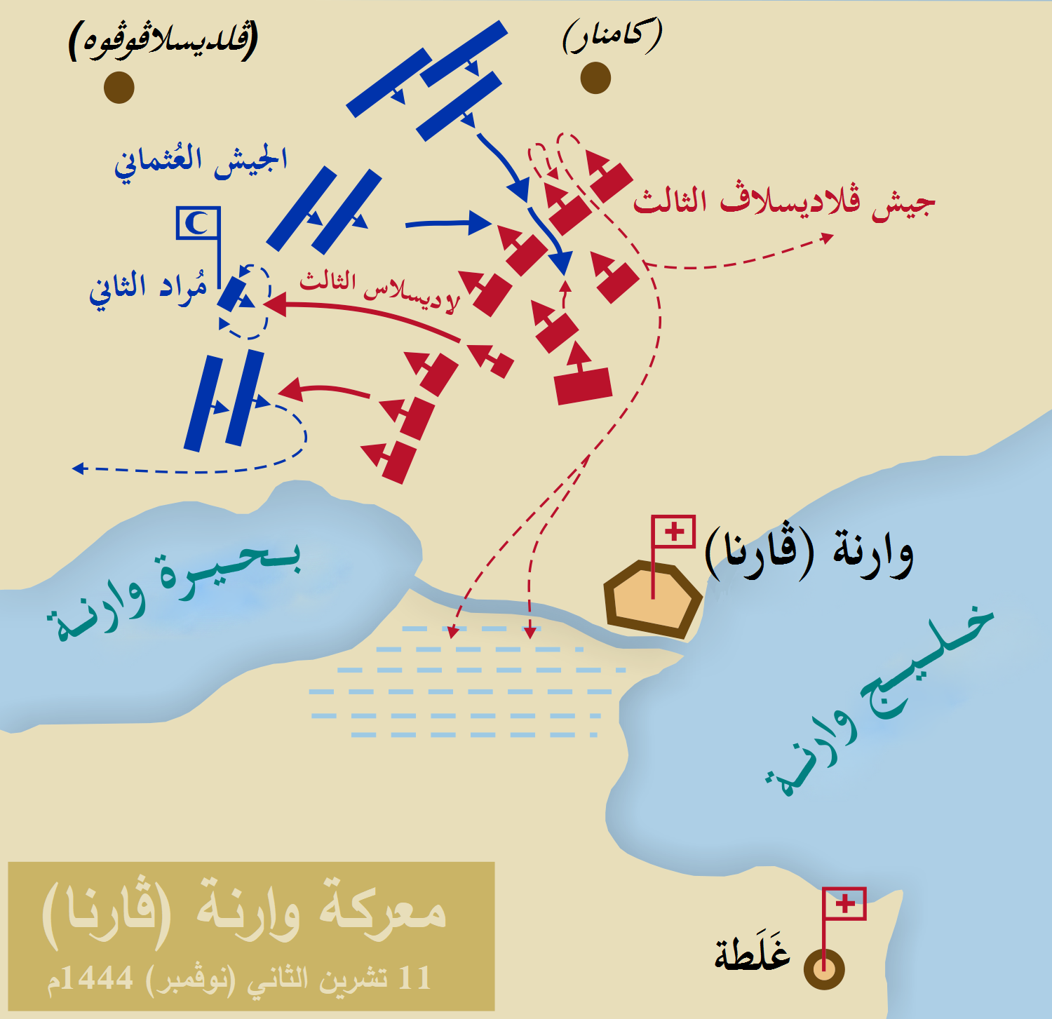 مُخطط معركة وارنة (ڤارنا) بين العُثمانيين والصليبيين، سنة 1444م.